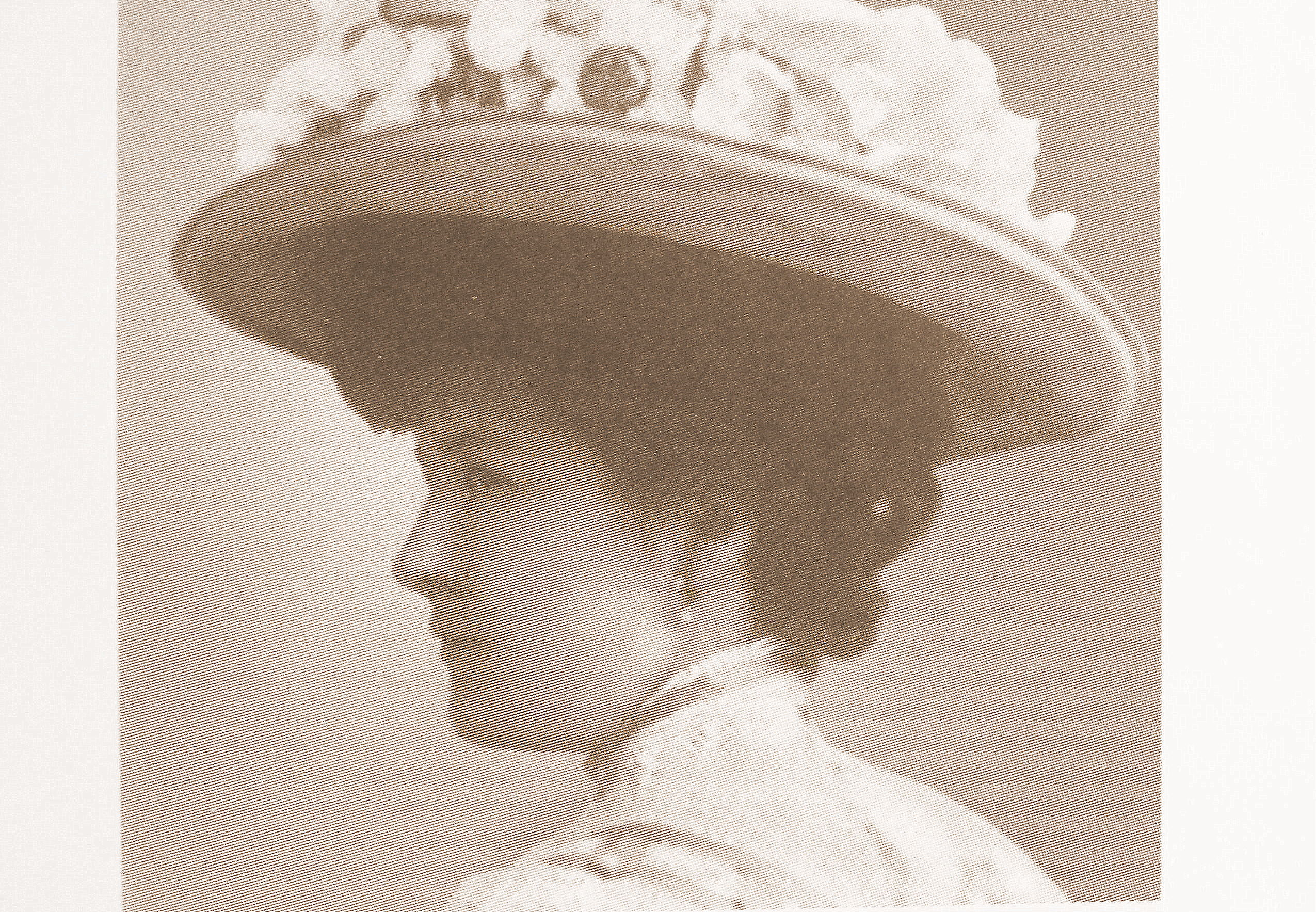 Кристина Элизабет Гудде (1886—1982)